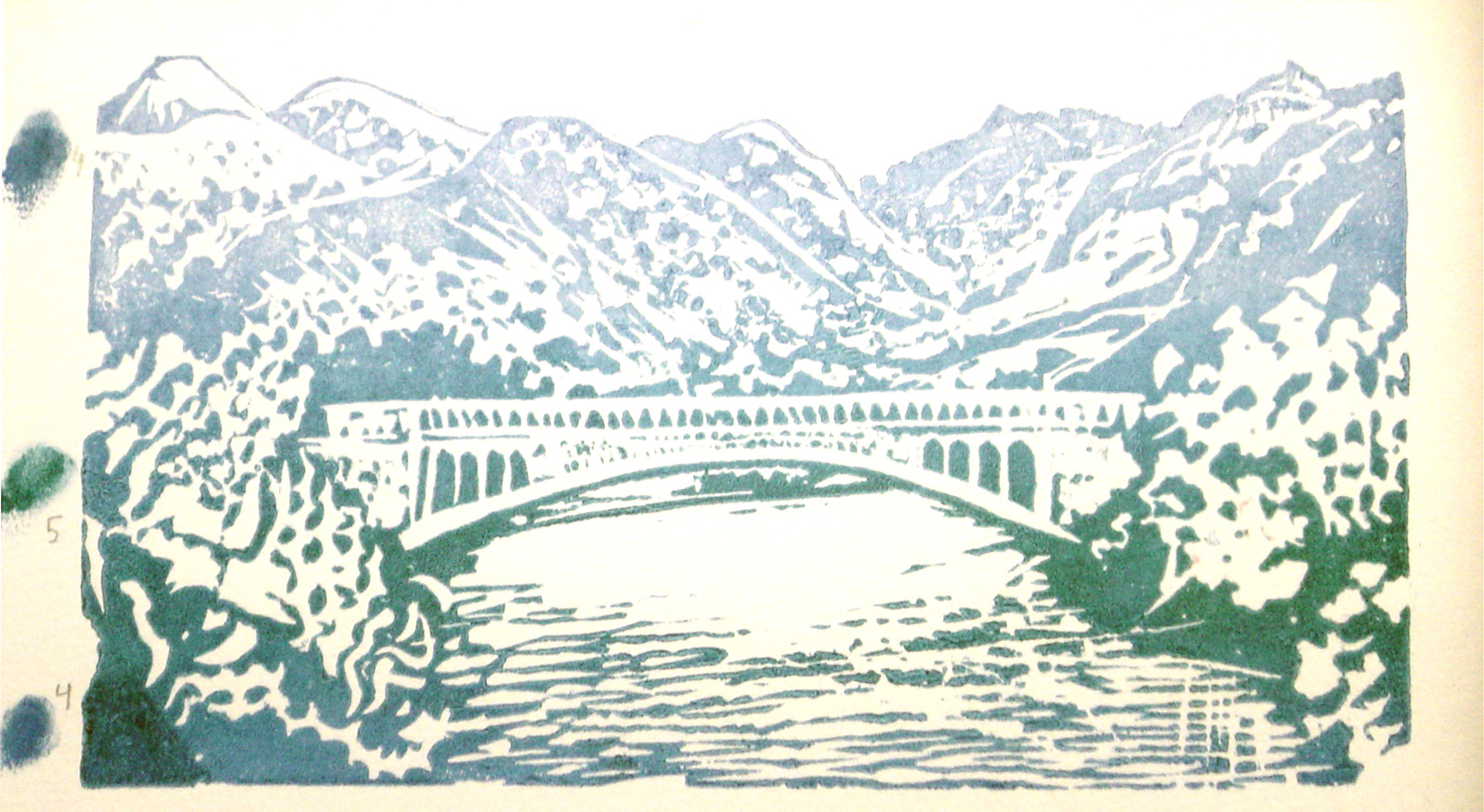 Linocut - plate number 3